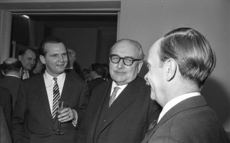 Der Präsident des Bundesrates empfängt Ministerpräsidenten der Länder, Mitglieder des Bundesrates und Mitglieder des Deutschen Presseclubs e.V., Bonn im Presseclub Mitte: BR-Präsident Kaisen rechts: Staatssekretär von Eckardt